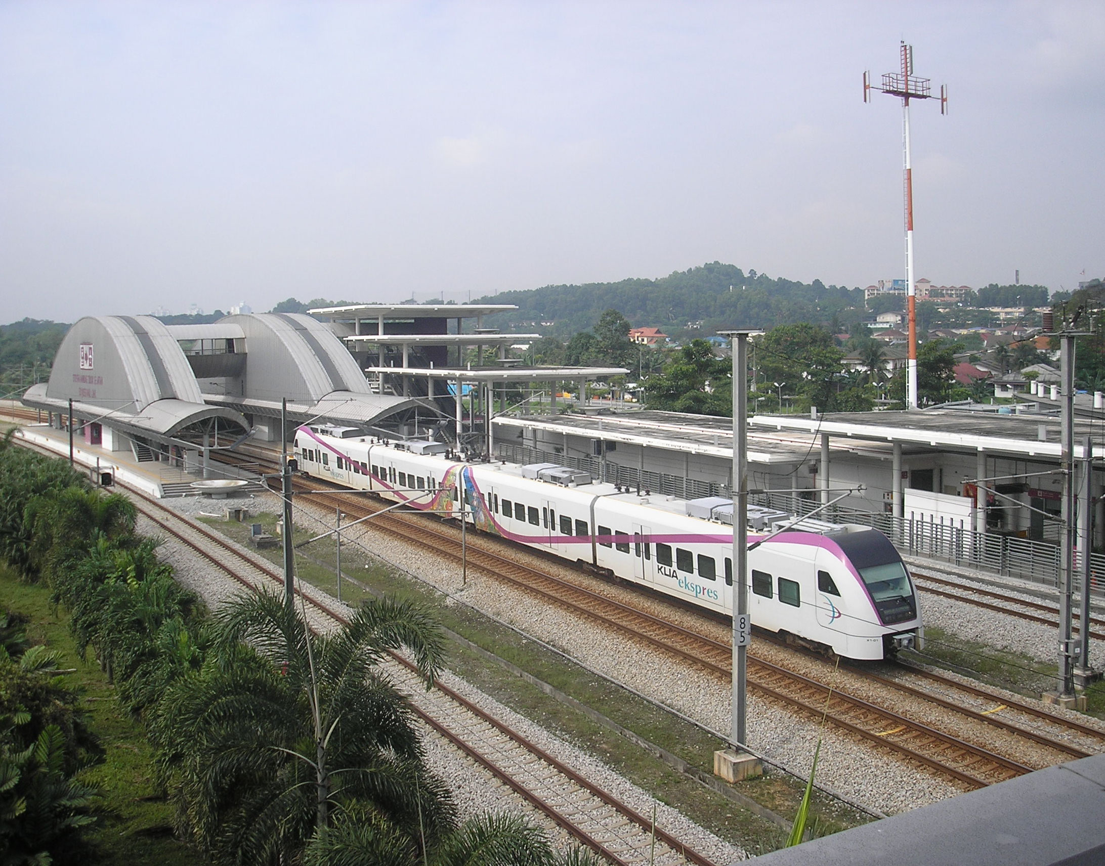 The Bandar Tasik Selatan station (KLIA Transit), Klang Valley, Malaysia.